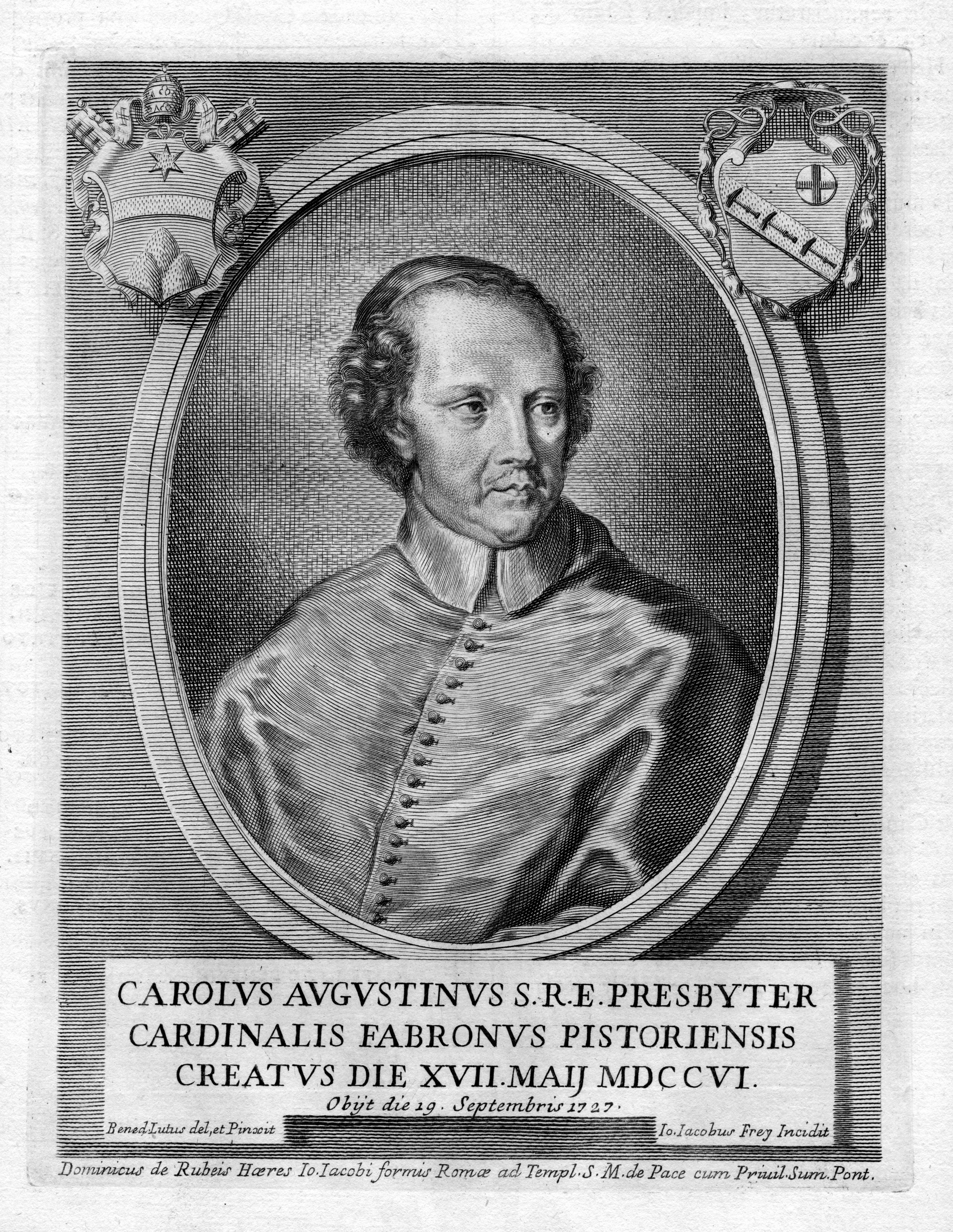 Portrait de Carlo Agostino Fabroni (1651-1727)